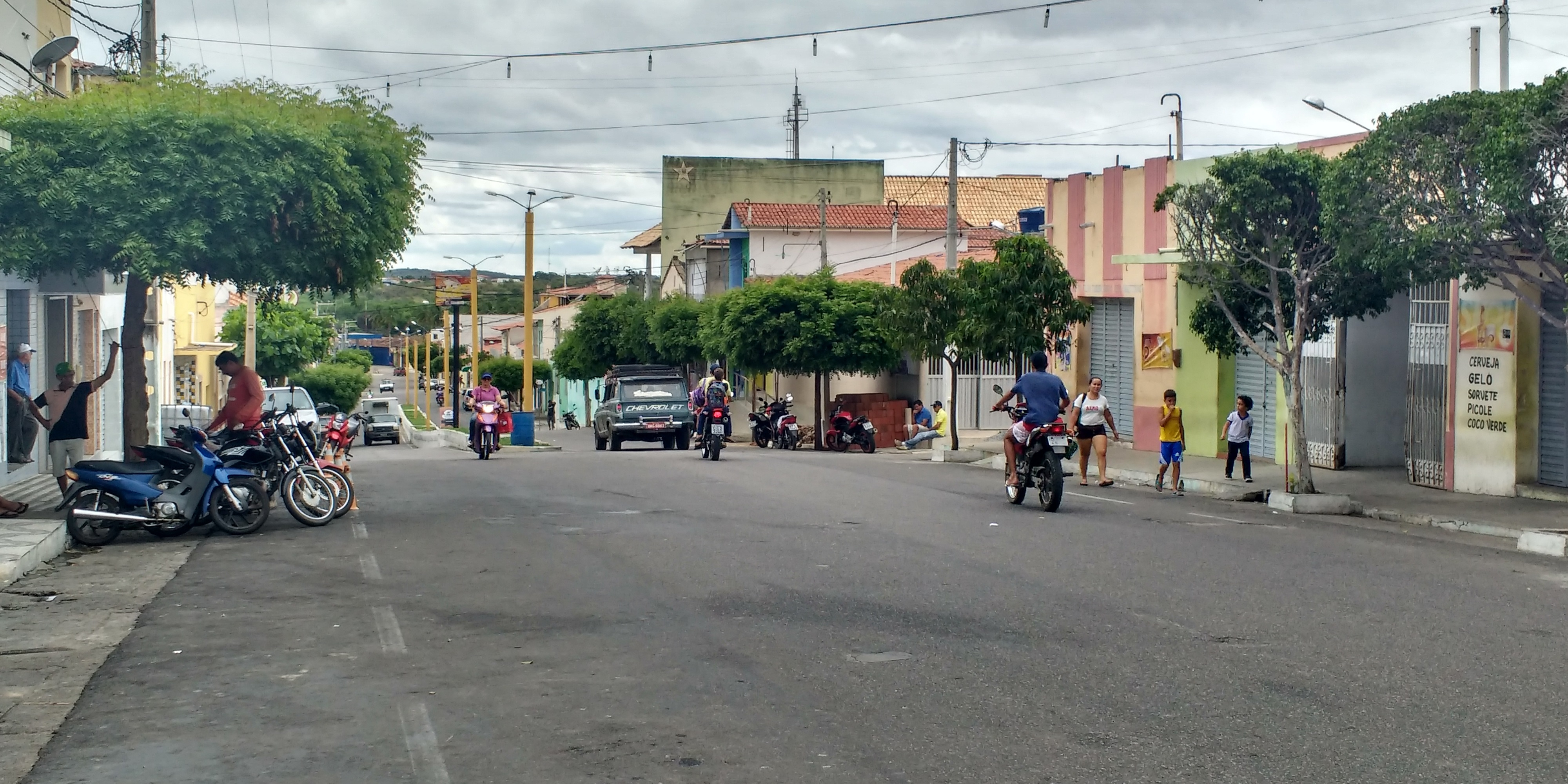 Rua José Moreira do Nascimento, em Tenente Ananias, Rio Grande do Norte (Brasil).